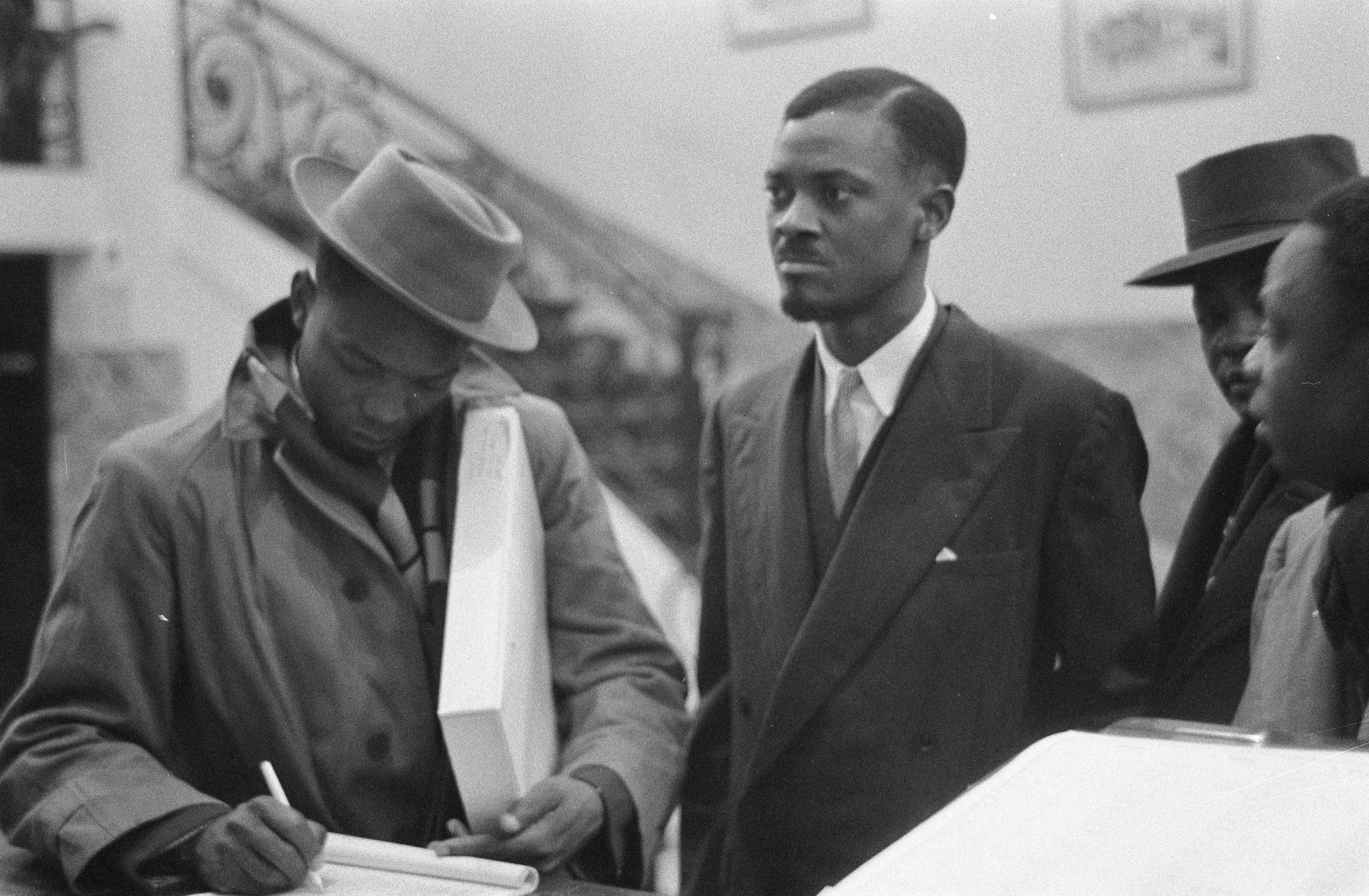 Collectie / Archief : Fotocollectie Anefo Reportage / Serie : [ onbekend ] Beschrijving : De Congolese leider Patrice Loemoemba in Brussel Datum : 26 januari 1960 Locatie : Brussel Trefwoorden : leiders Persoonsnaam : Lumumba, Patrice Fotograaf : Pot, Harry / Anefo Auteursrechthebbende : Nationaal Archief Materiaalsoort : Negatief (zwart/wit) Nummer archiefinventaris : bekijk toegang 2.24.01.05 Bestanddeelnummer : 910-9741